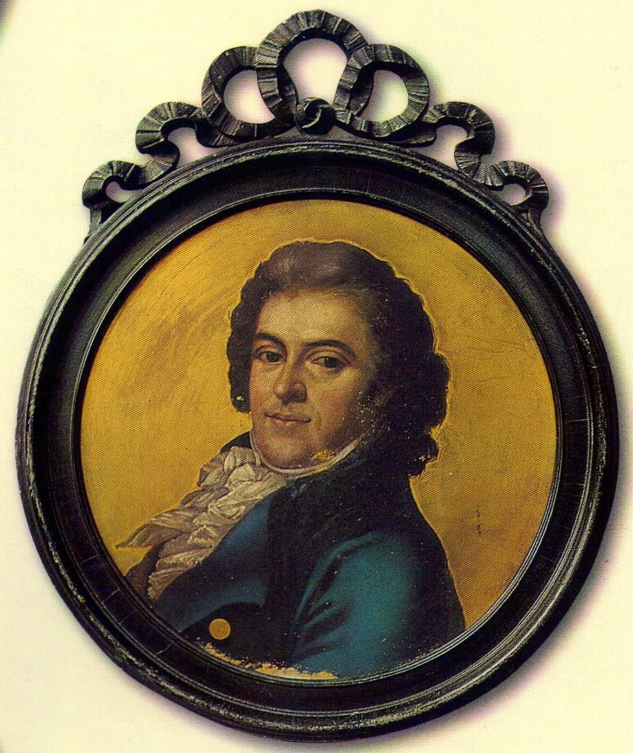 Portret Mikołaj Krzywiec-Okołowicza